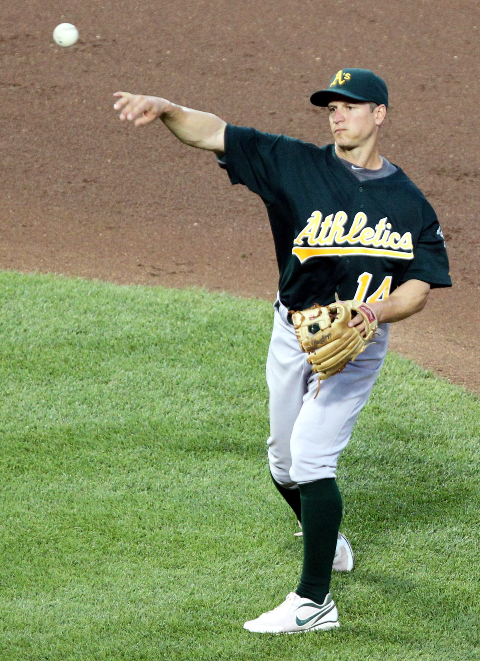 Mark Ellis